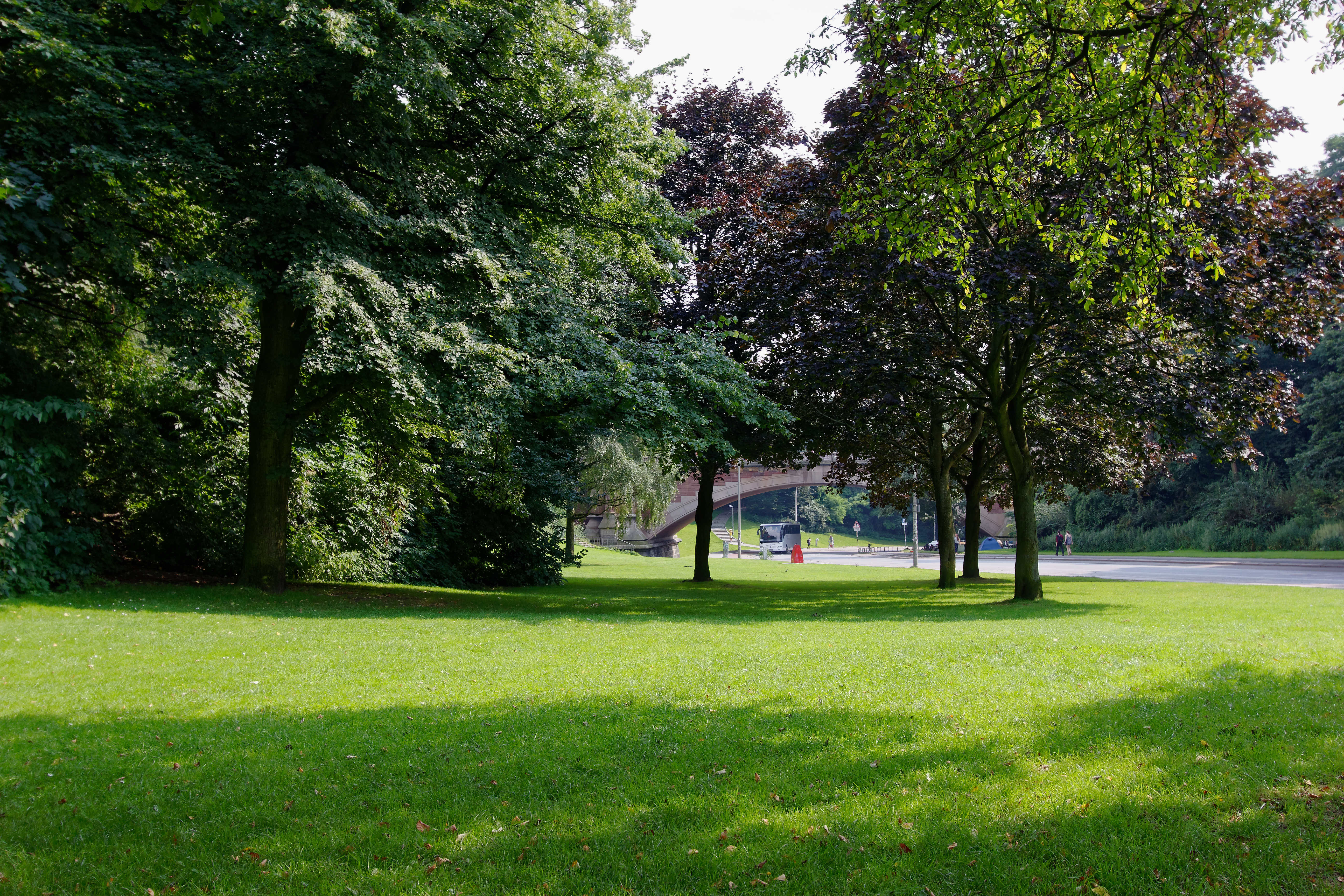 Hamburg, Alter Elbpark, Kersten-Miles-BrückeThis is a photograph of an architectural monument.